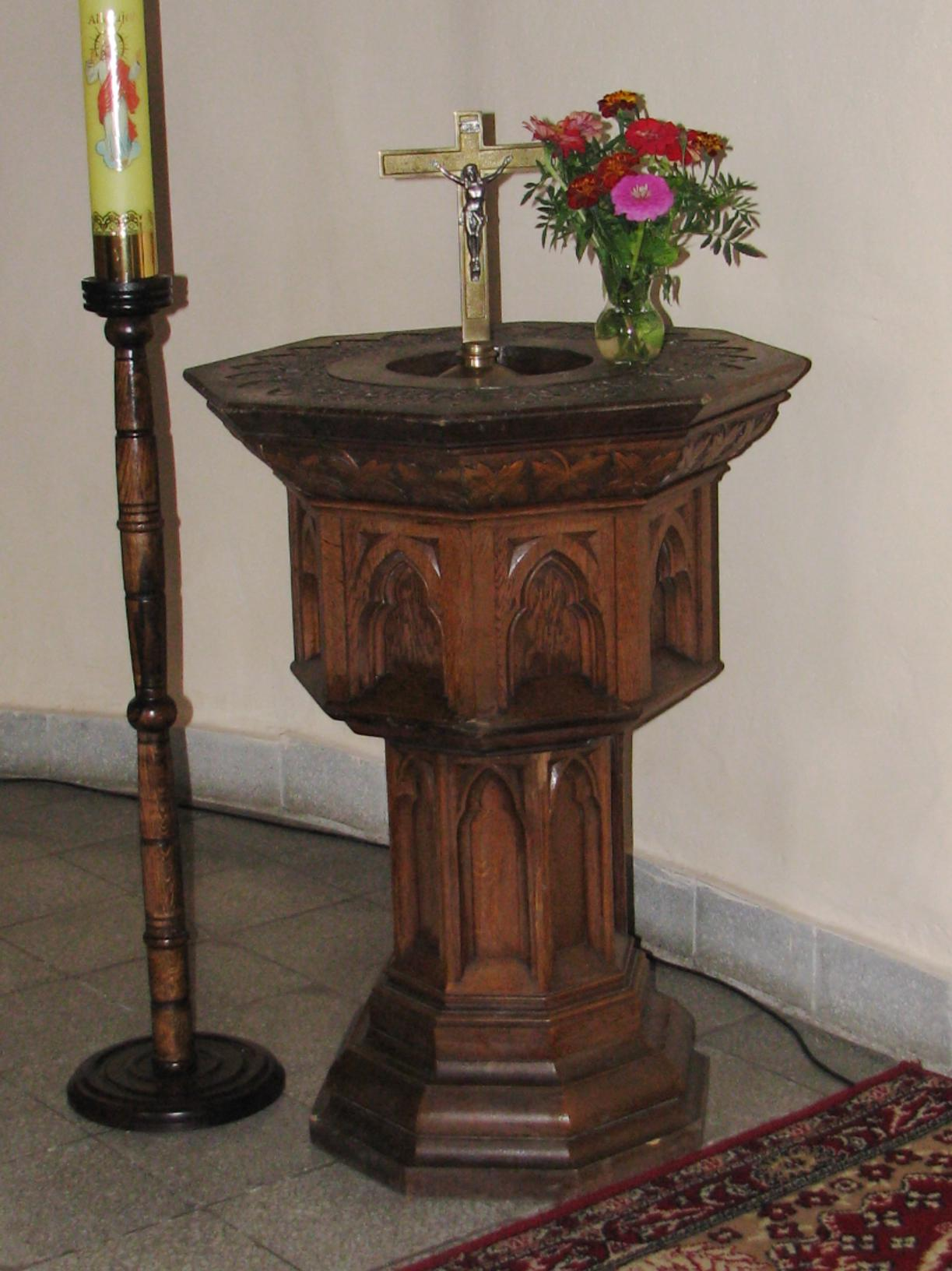 Kościół w Wojcieszycach. Chrzcielnica